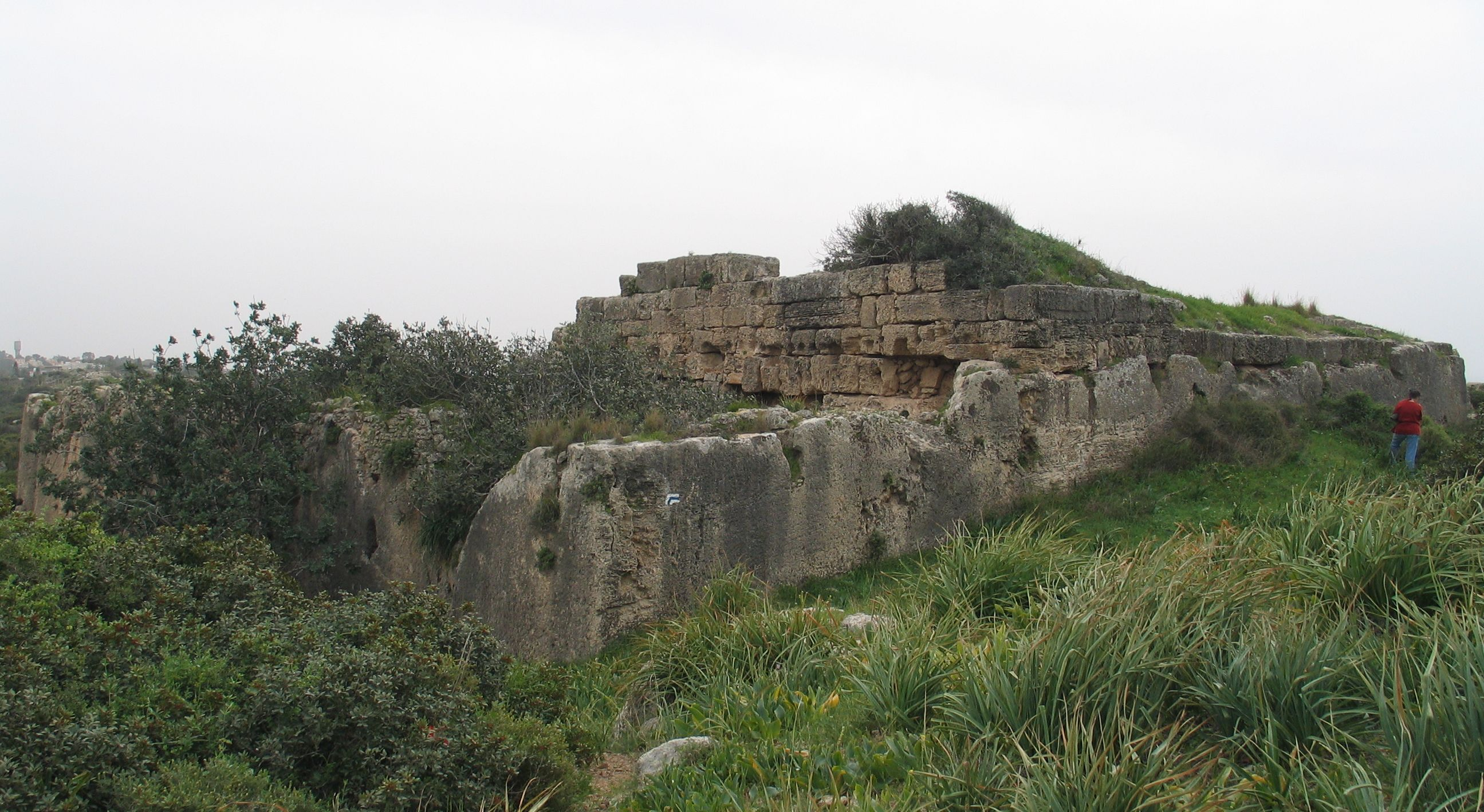 Le Destroit fortress, Israel.